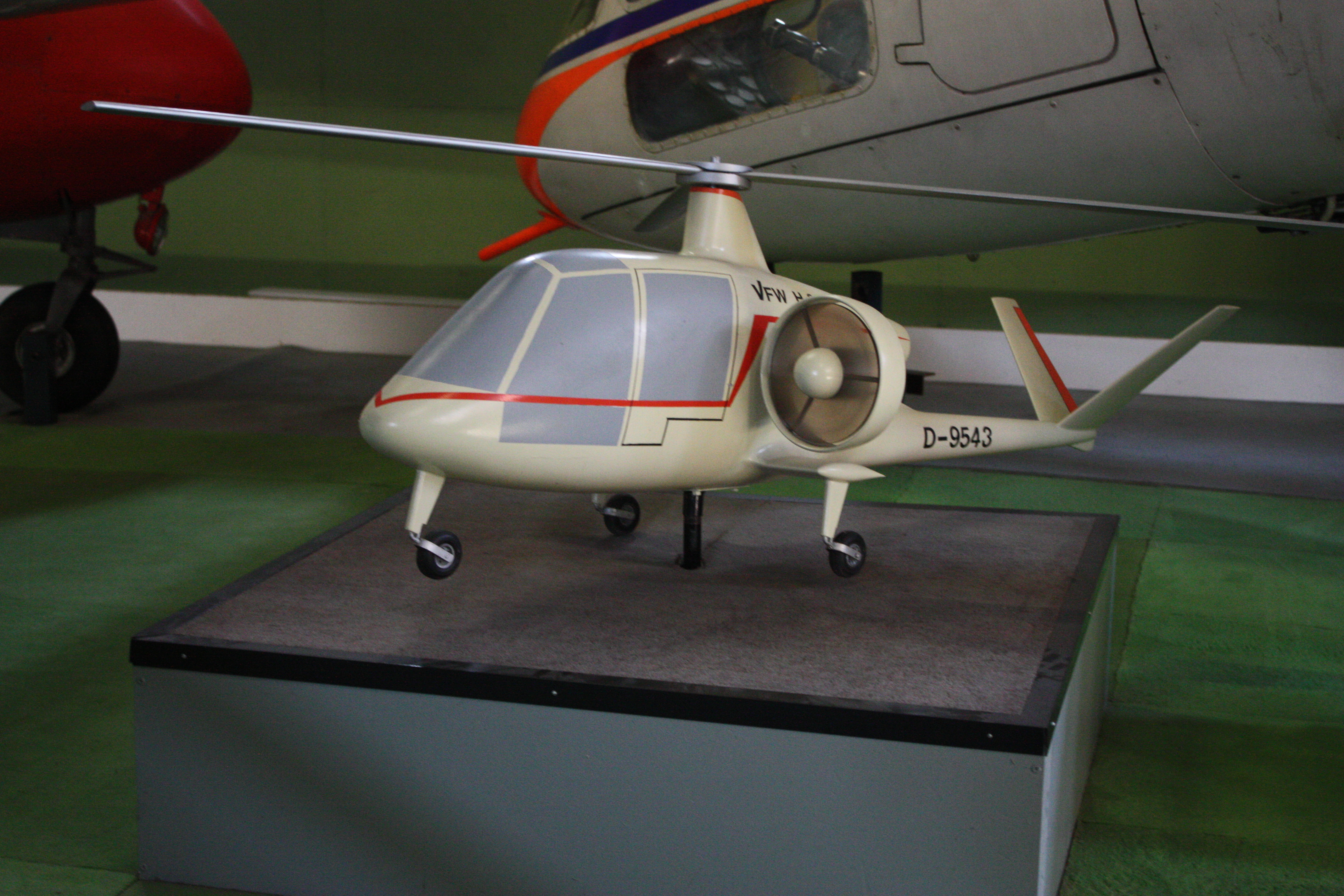 Hubschraubermuseum Bückeburg